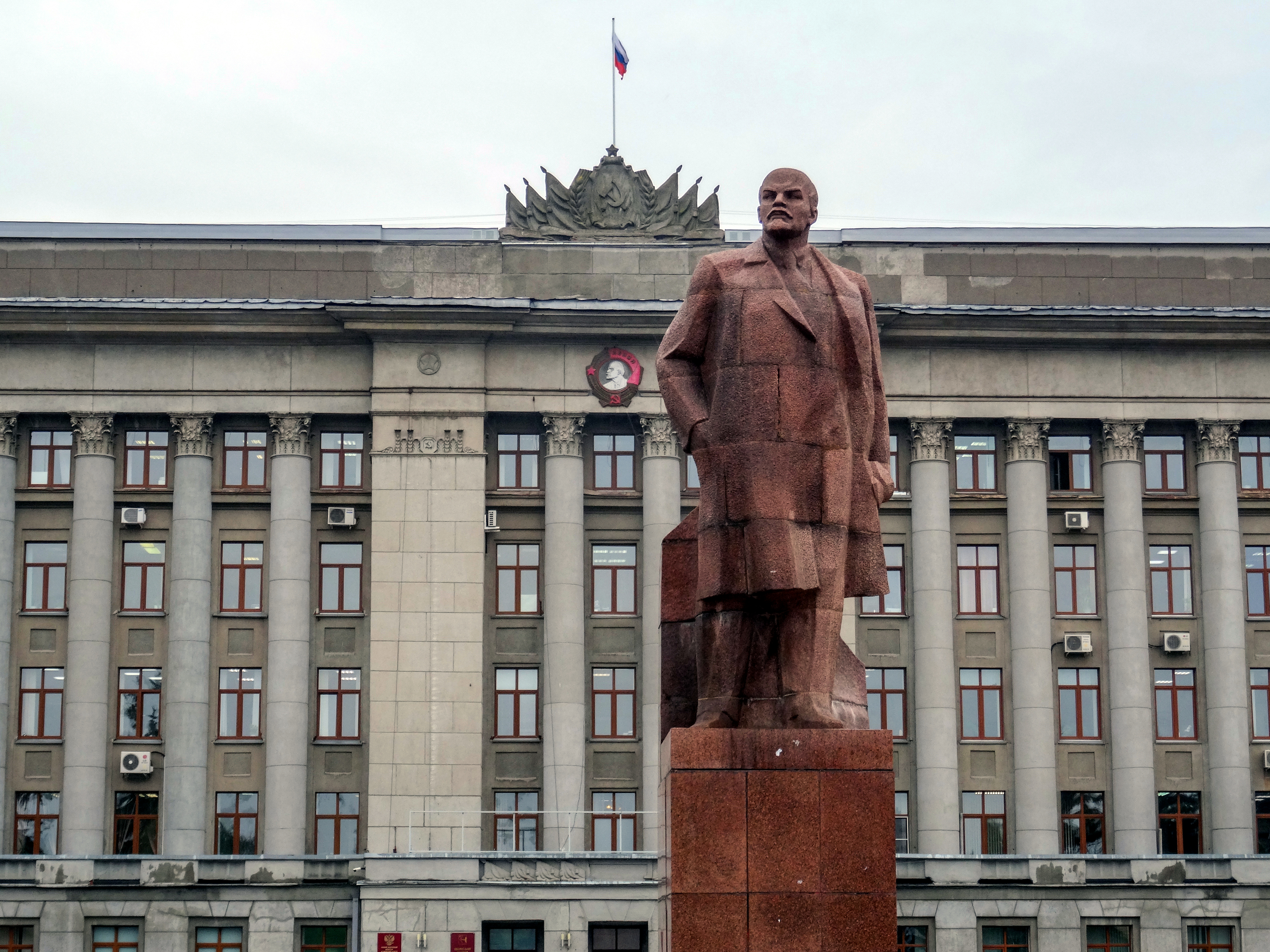 Памятник В.И. Ленину: площадь Театральная (бывшая площадь Советов), Киров, Кировская область